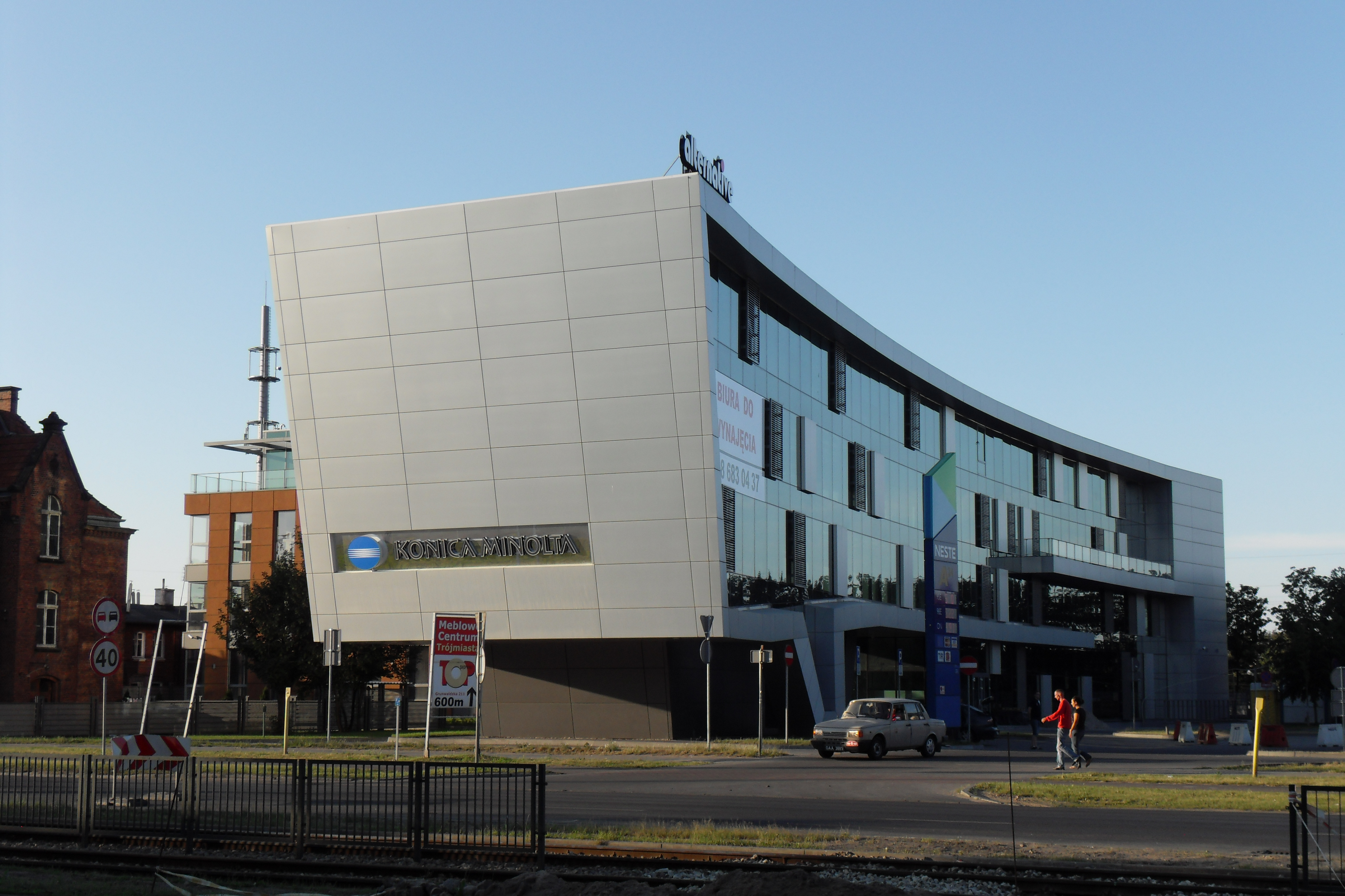 Gdańsk Wrzeszcz, al. Grunwaldzka 163. Biurowiec "Office Island".